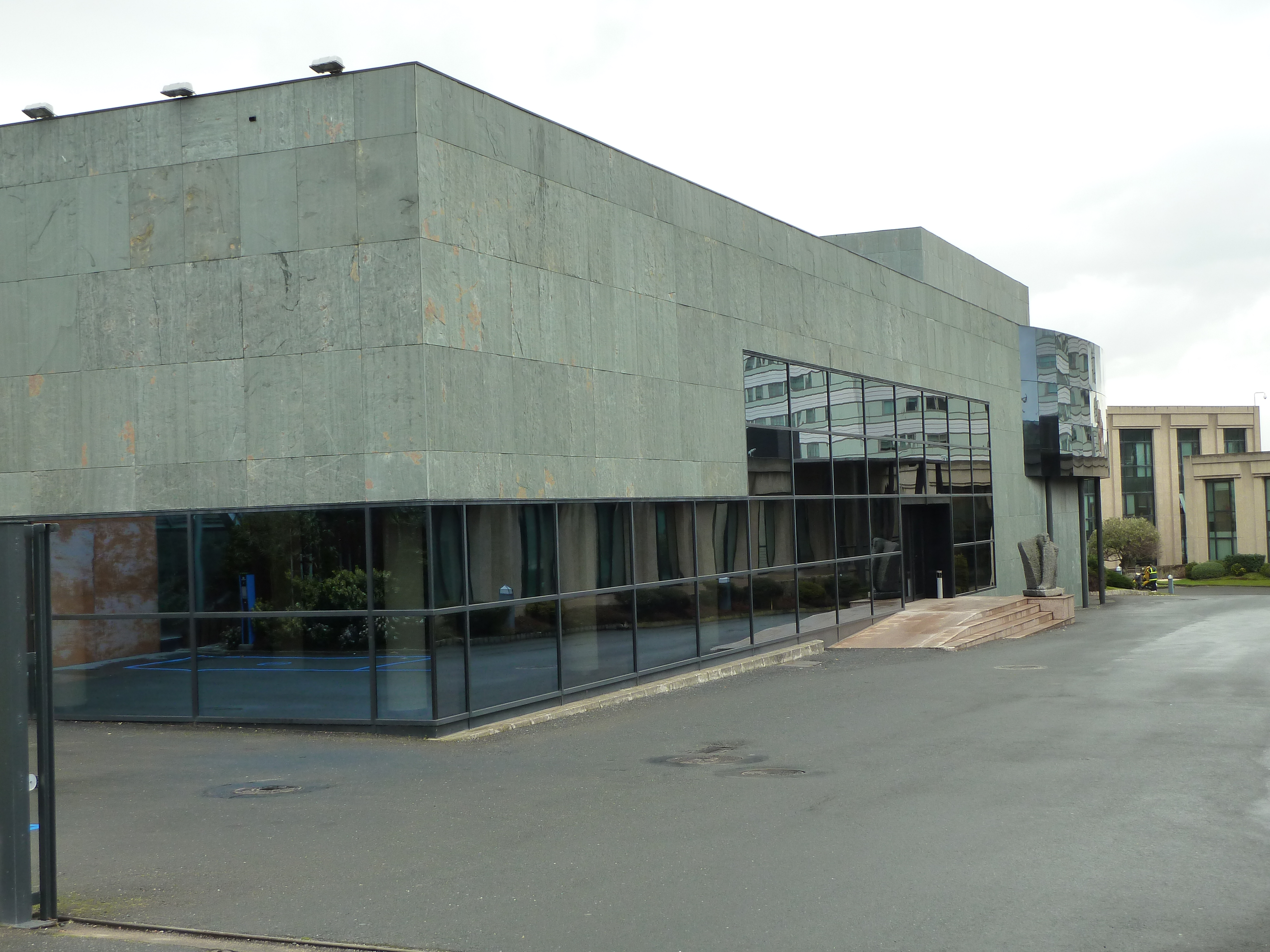 Fachada museo de Arte Contemporáneo Unión Fenosa na Coruña.